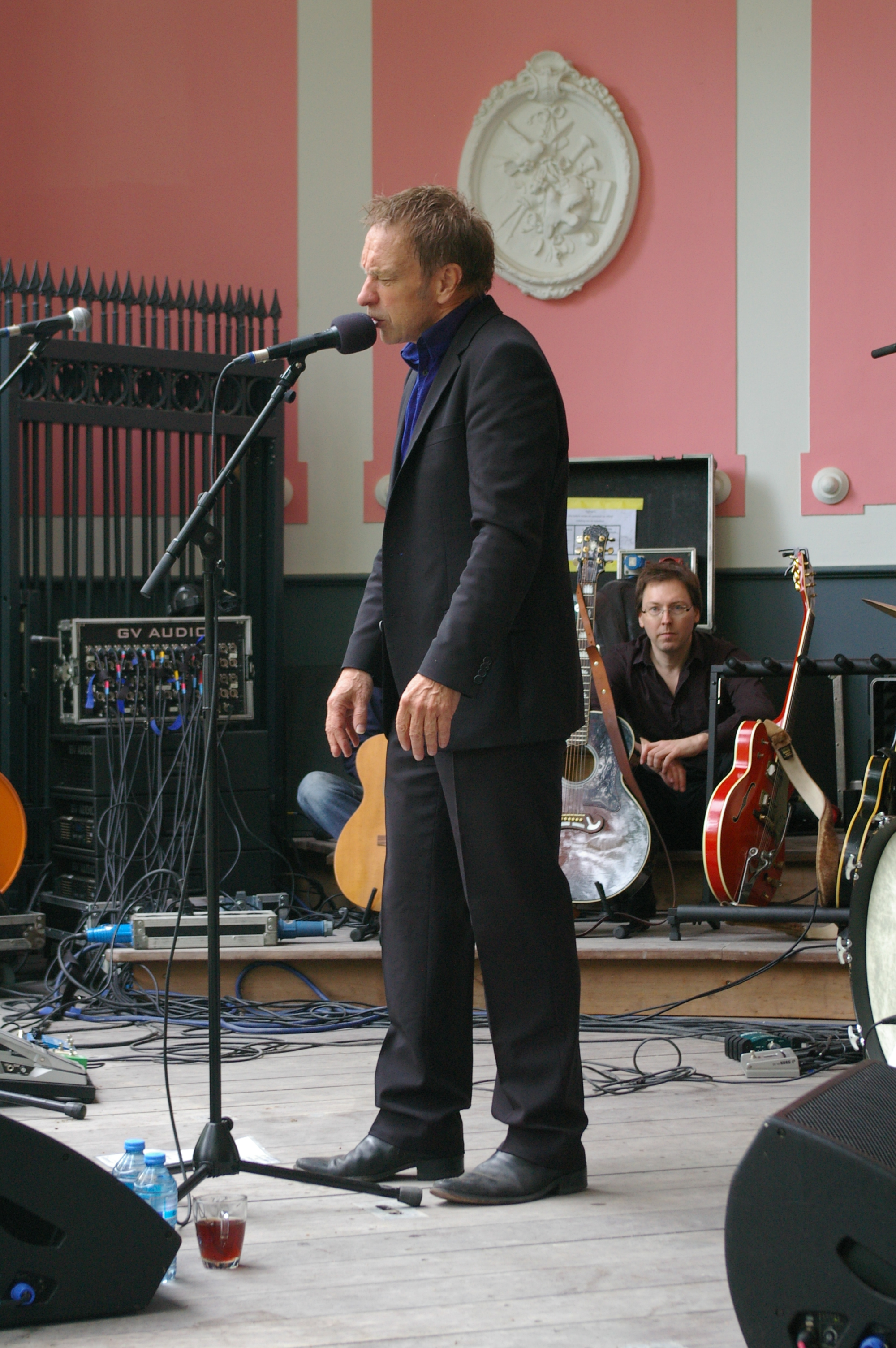 Alex Roeka (Ravenstein, 1955) is een Nederlandse zanger. Alex Roeka in de prinsentuin te Leeuwarden